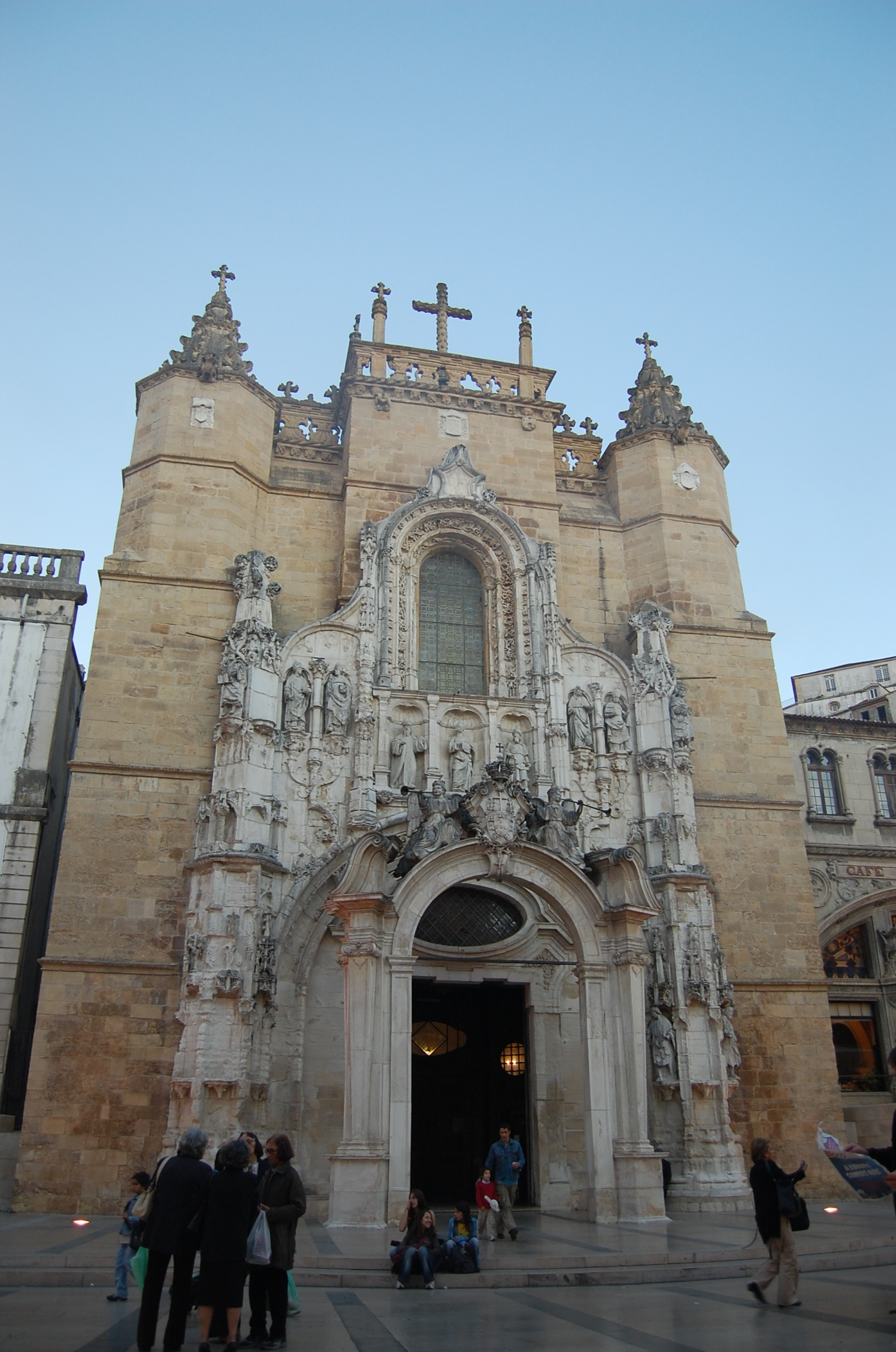 Mosteiro de Santa Cruz, centro de Coimbra.